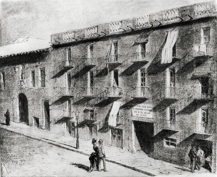 Dibuix de Domènec Soberano de la Boella, casa natal de Marià Fortuny